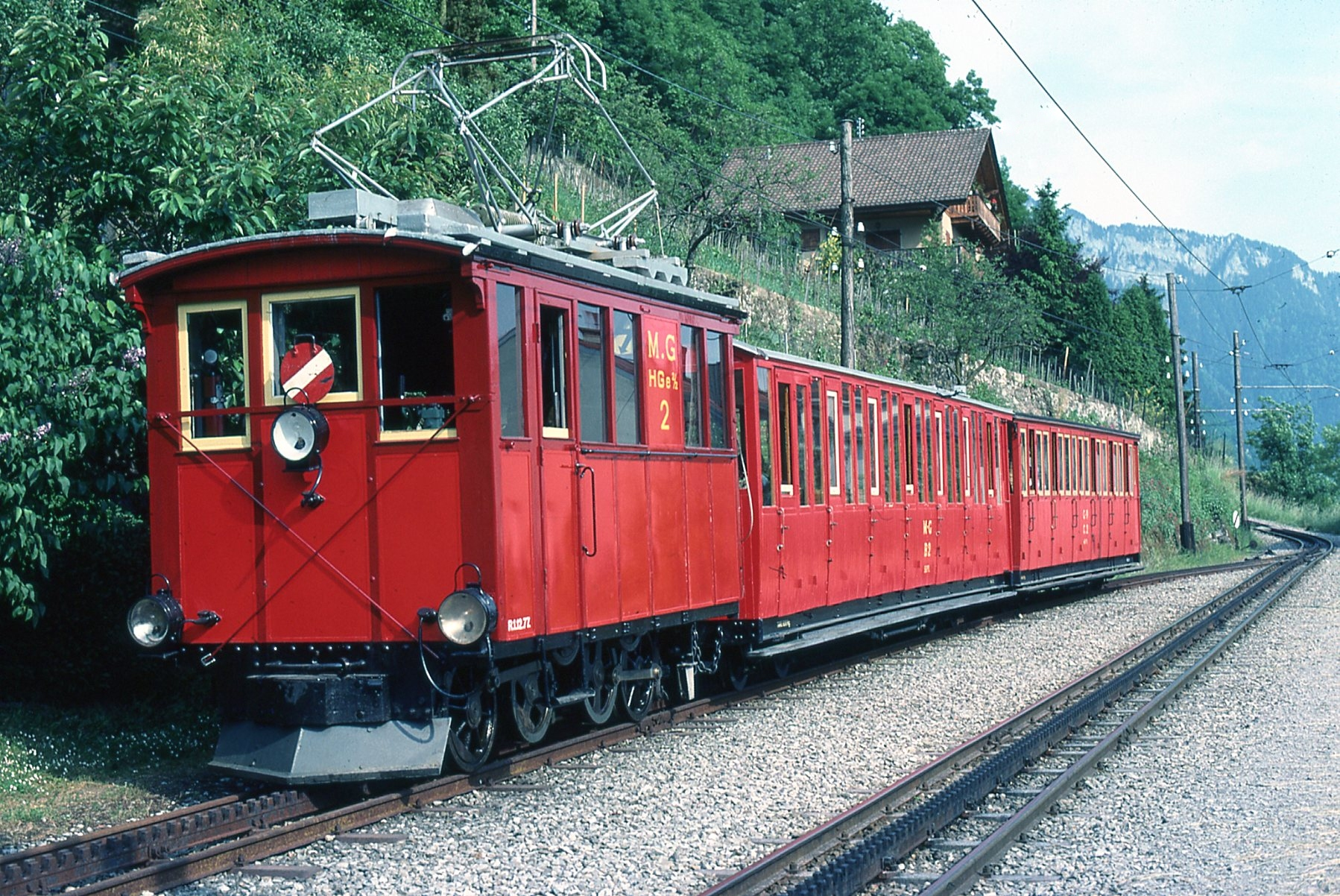 Photo. Trams aux Fils Prise en juin 1978 à la station de Montreux - Les Planches La ligne du Montreux Glion Naye à été construite entre 1892 et 1909, à voie étroite (80cm) et à crémaillière, sa longueur et de 10,5 Kilomètres, sa déclivité est de 220%.